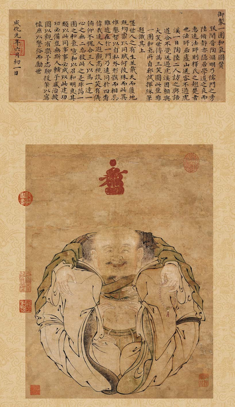 明憲宗朱見深做《一團和氣》，纸本设色，纵48.7cm，横36cm，现藏北京故宫博物院。